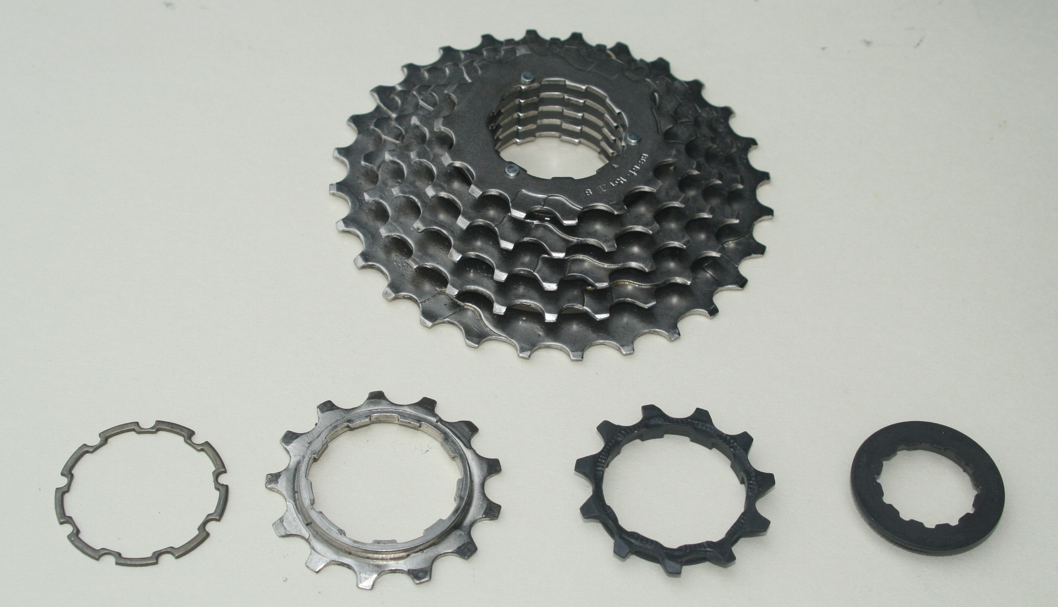 Shimano 7-speed cassette dismantled